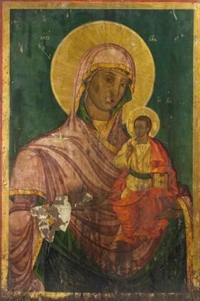 Богородица со Христос, црква Св. Богородица, с. Јелошник. 1834 година. Автор неидентификуван. Дим: 67 Х 47 Х 2,5 см